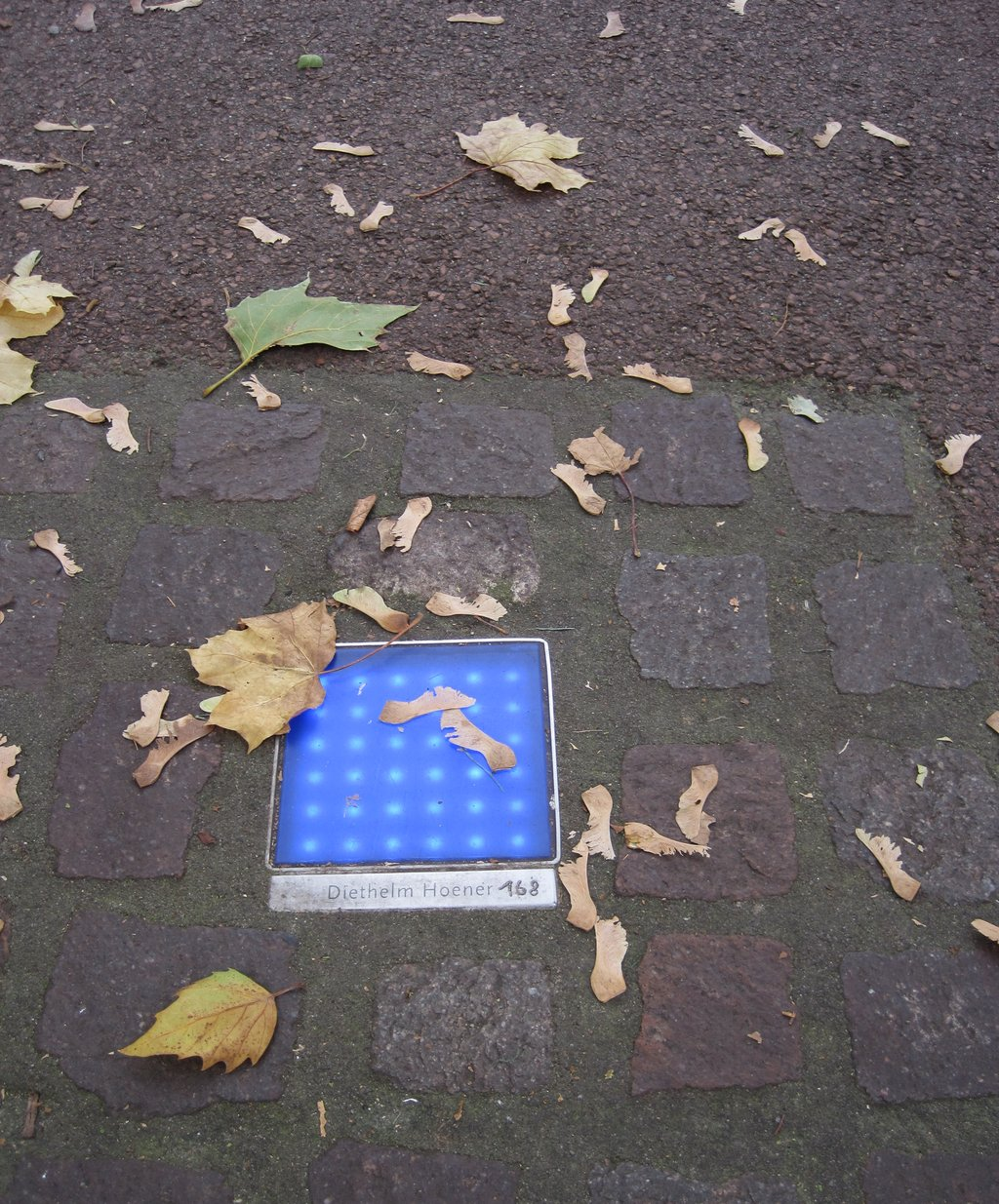 Blaue Kacheln des Kulturpfads in Essen.